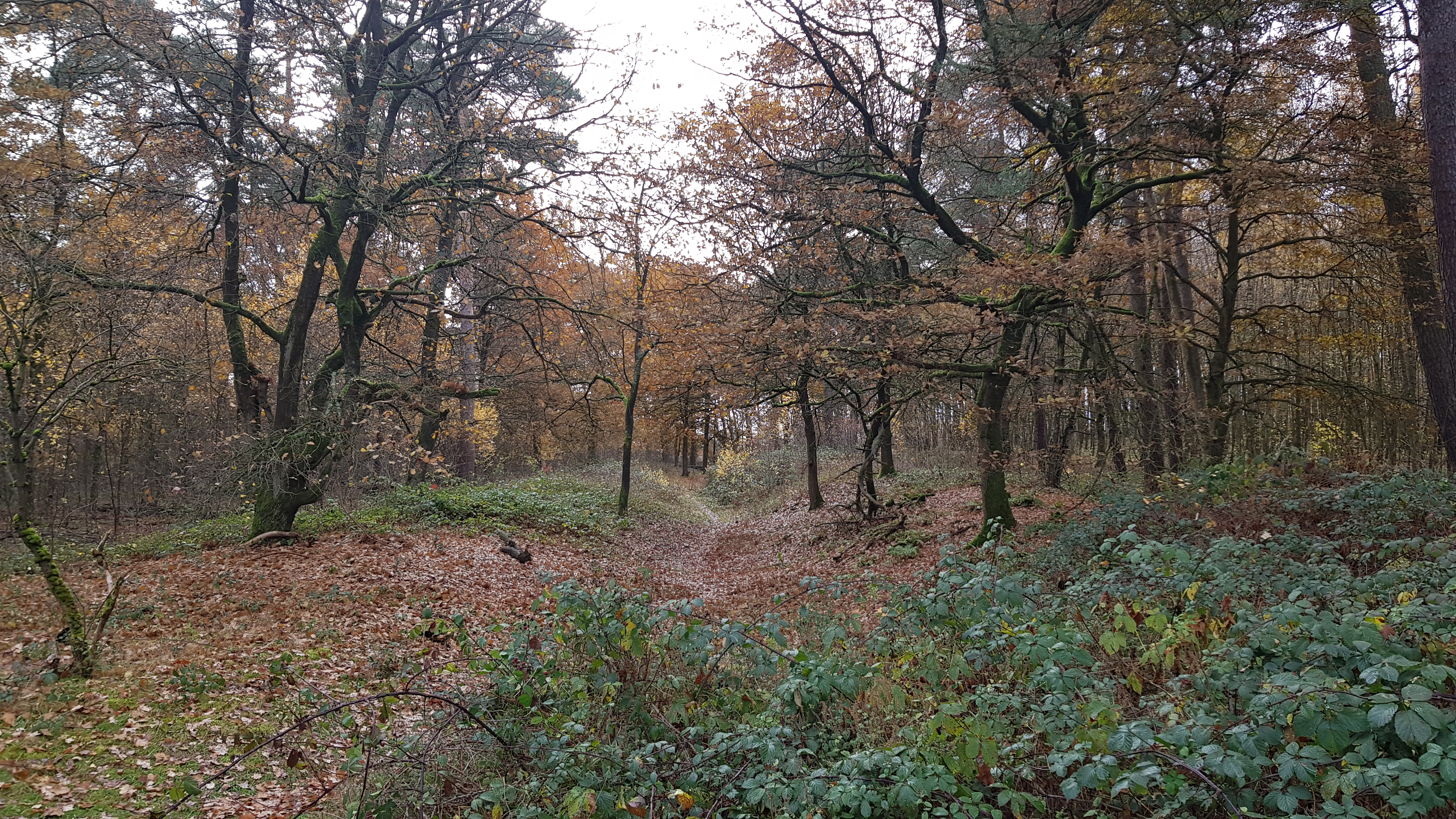 Landgraaf Brunssummerheide, Heerlen, Nederland